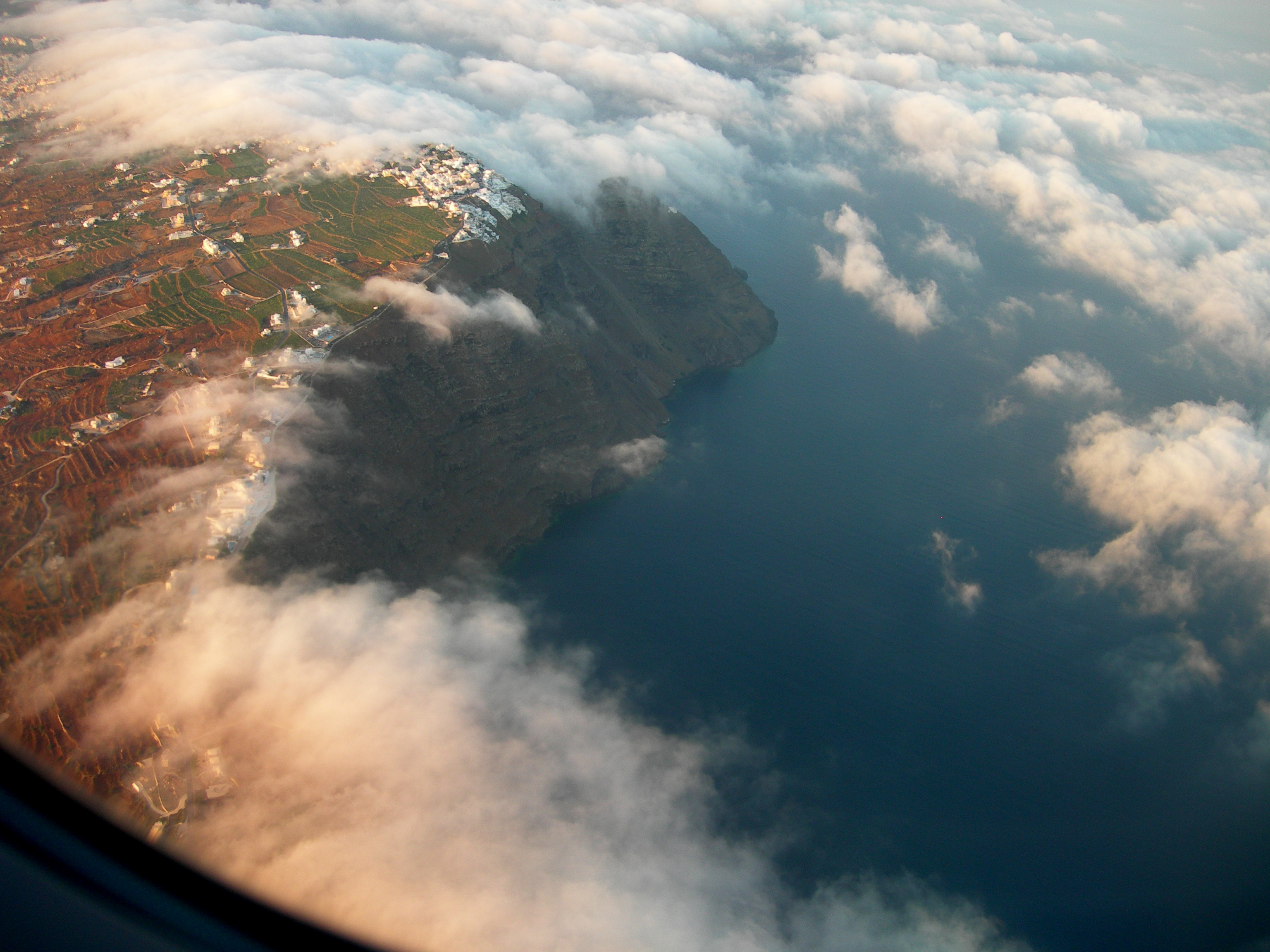 à l aube au dessus de santorin